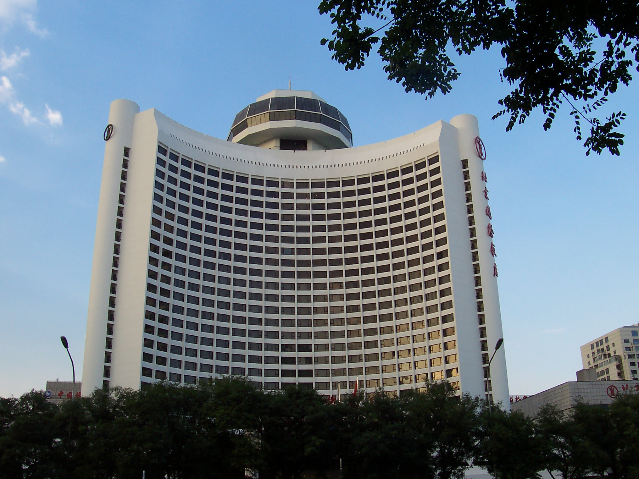 北京国际饭店